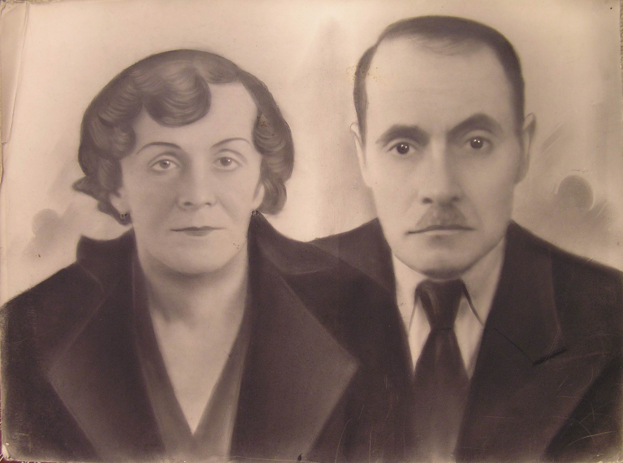 Иван Казимирович и Елена Климентьевна Козловские